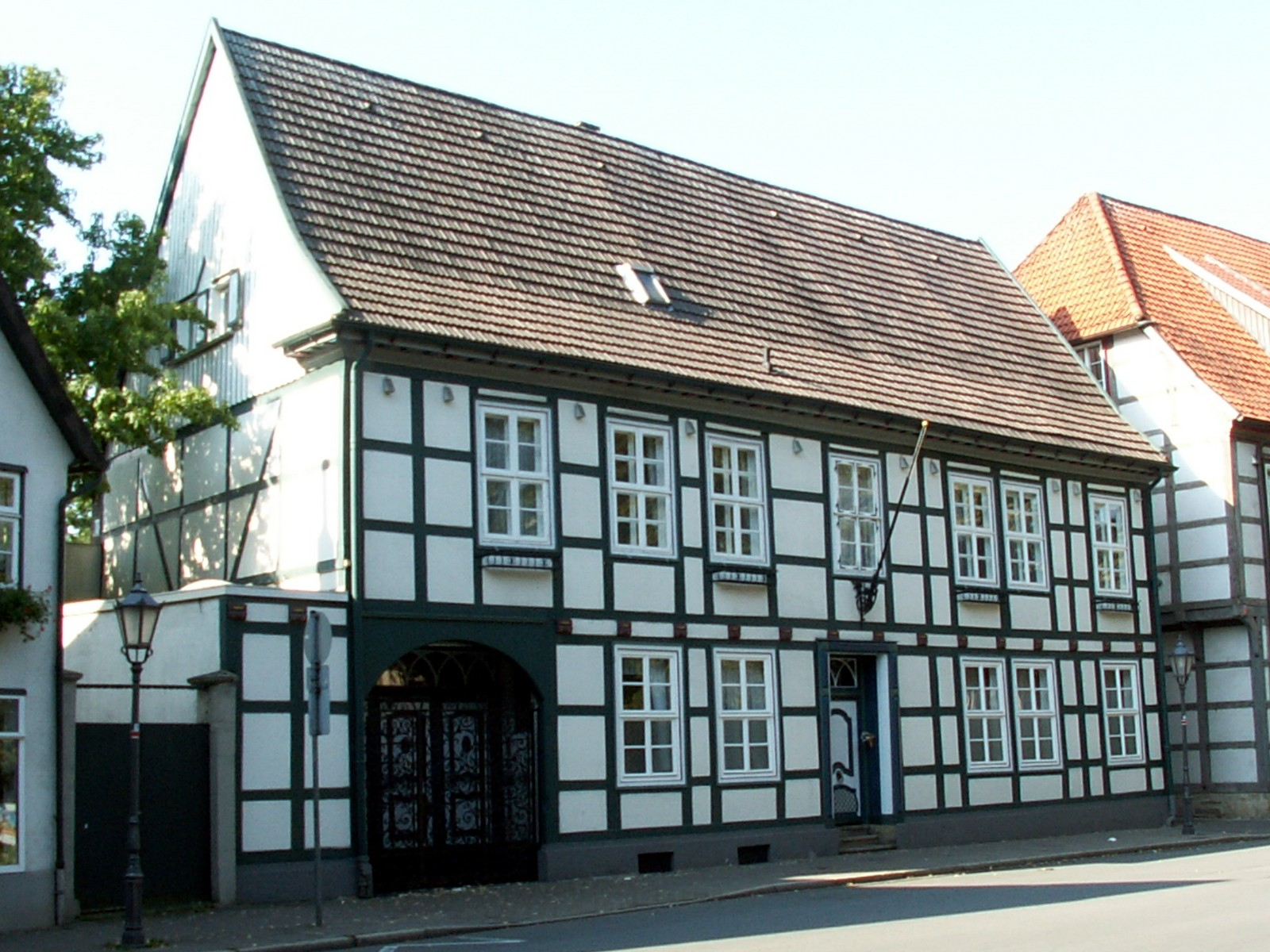 Fachwerkhaus in Herford, Elisabethstraße 11, Baudenkmal Nr. 35, Ansicht von Nordosten